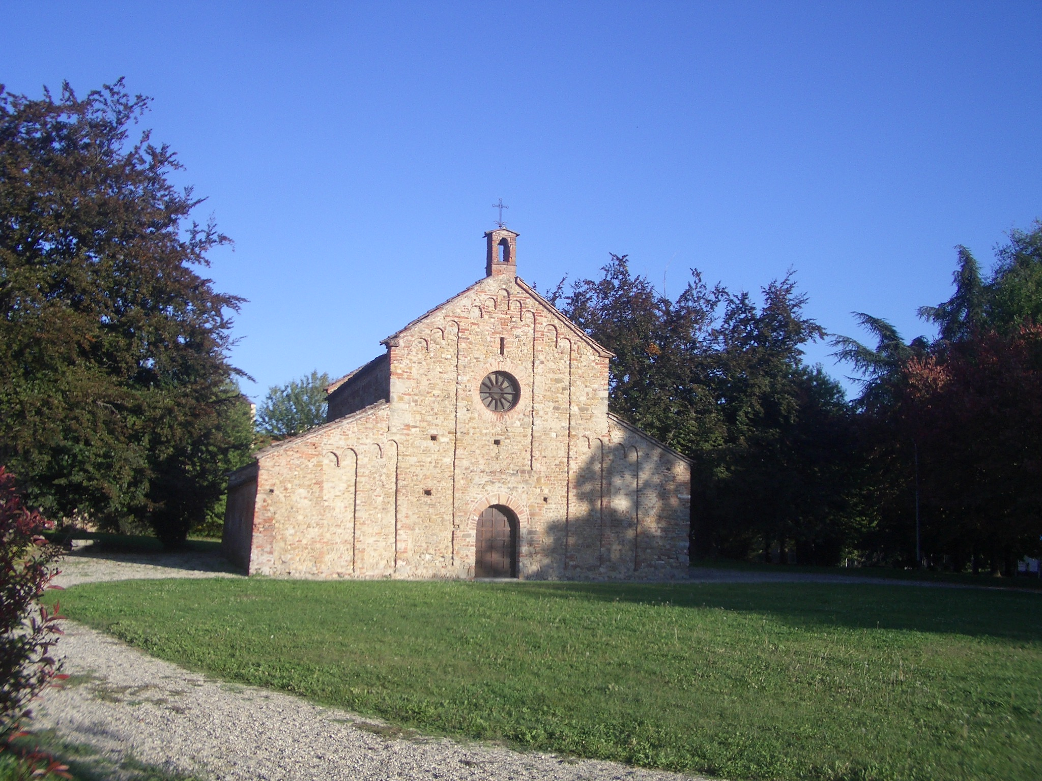 Pieve di Santa Maria, Viguzzolo, Alessandria, Italy